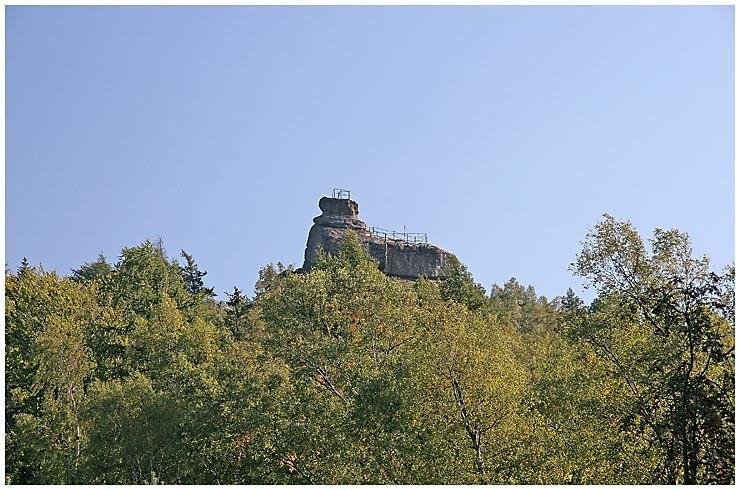 Vyhlídková pískovcová skála Popova skála u Hrádku nad Nisou, district Liberec autor: Prazak date: 9. 2006